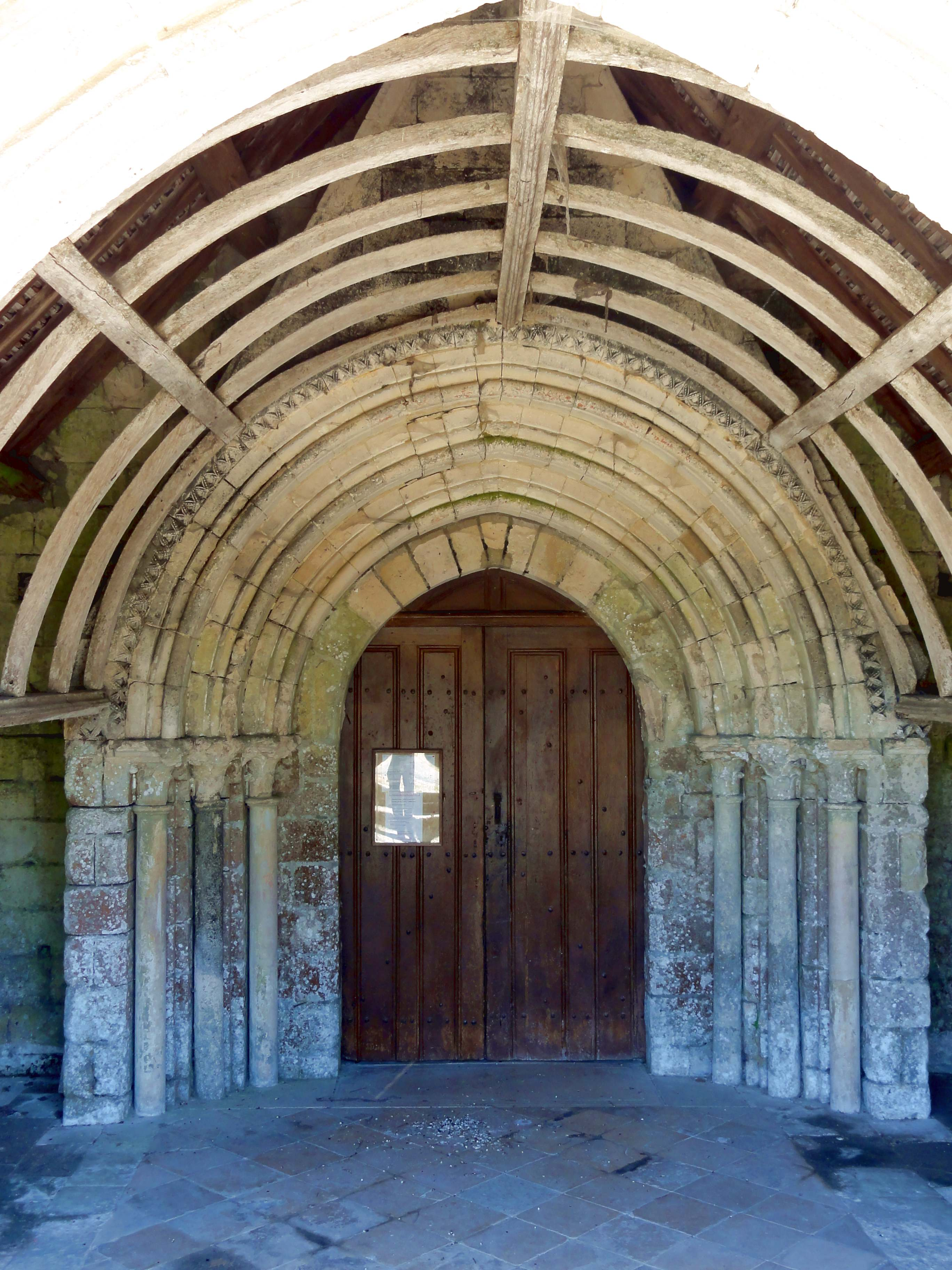 Voir titre.